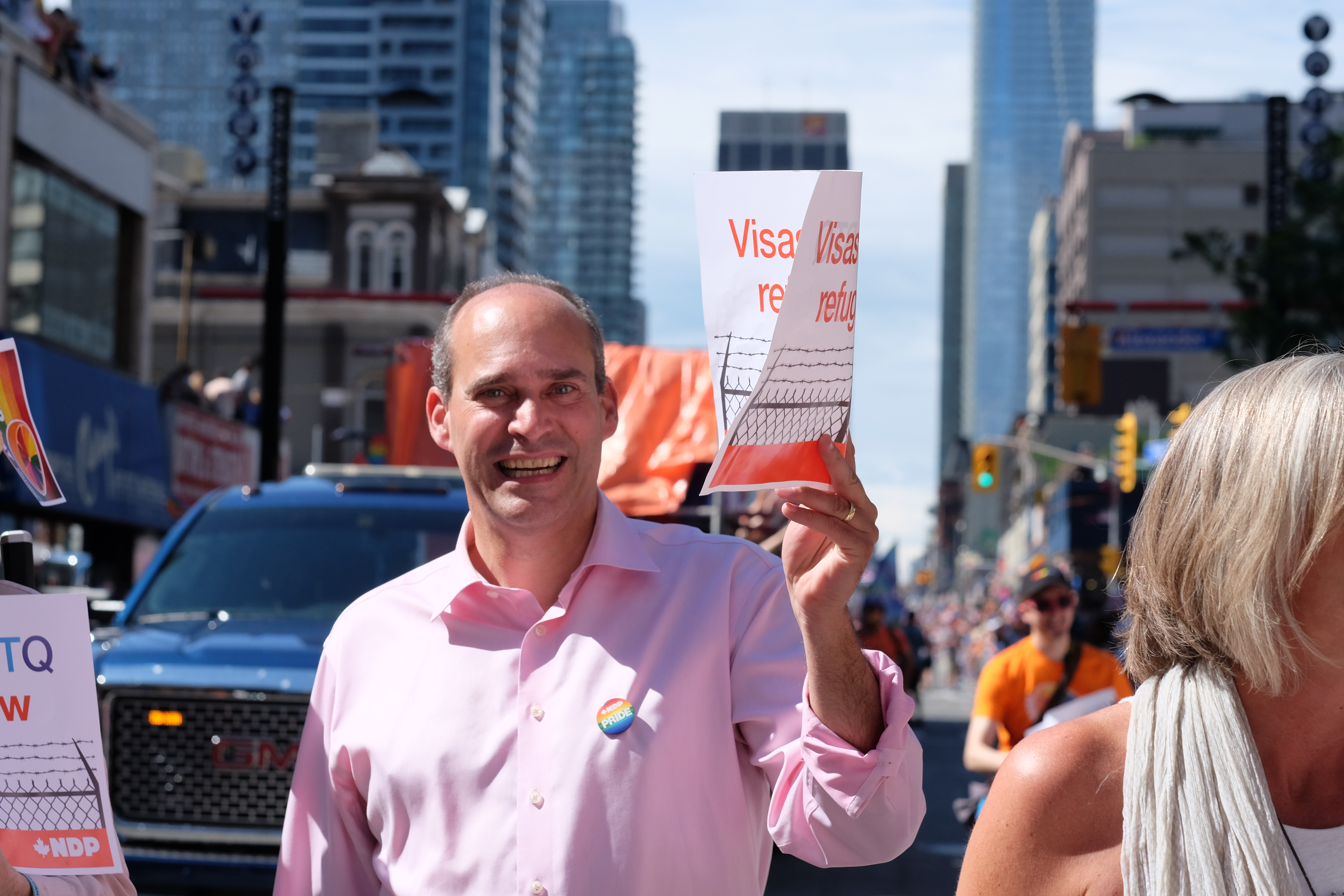 Guy Caron at Toronto Pride Parade in 2017